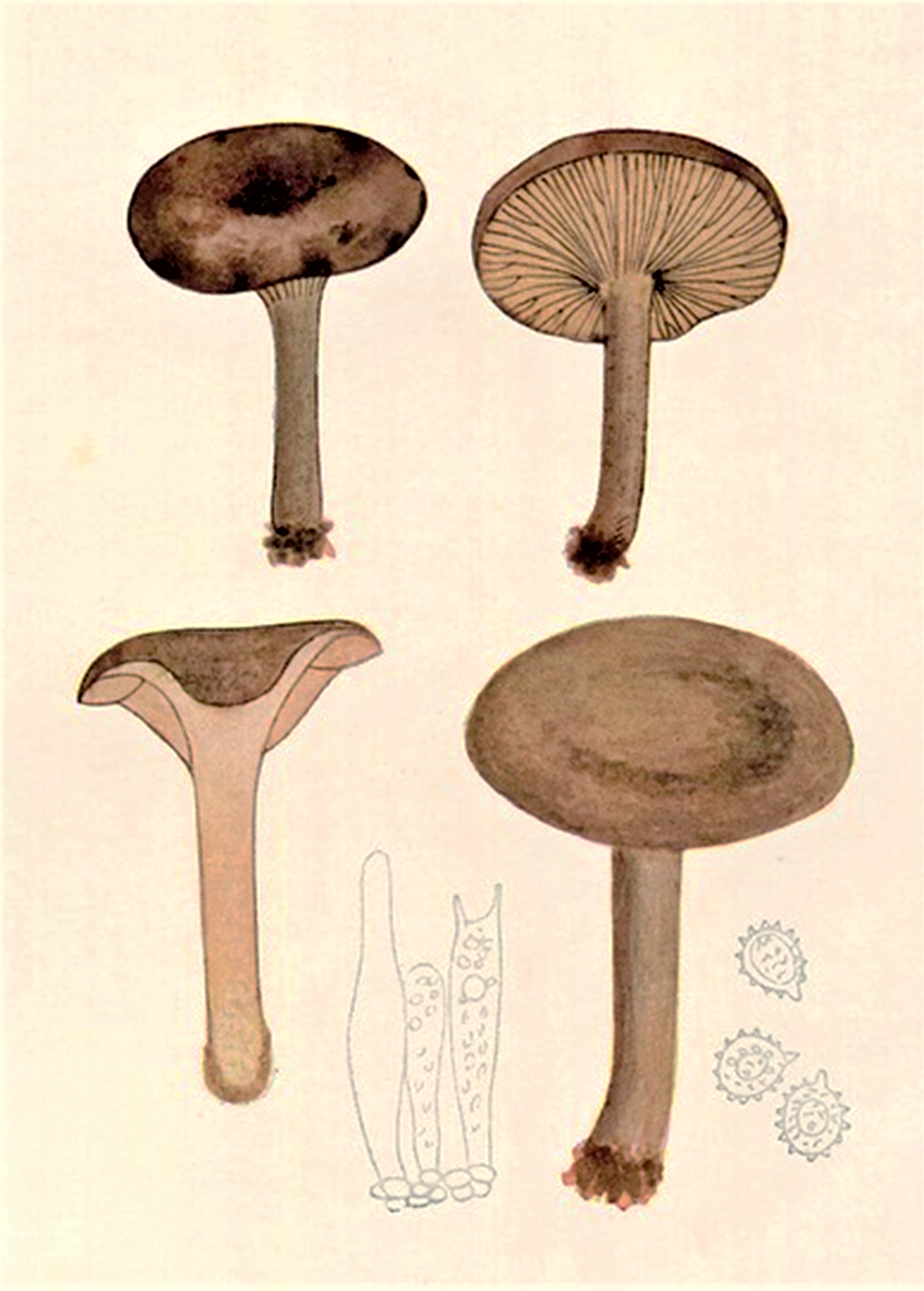 Giacomo Bresadola: Lactarius camphoratus (Bull., 1793) Fr. (1838)